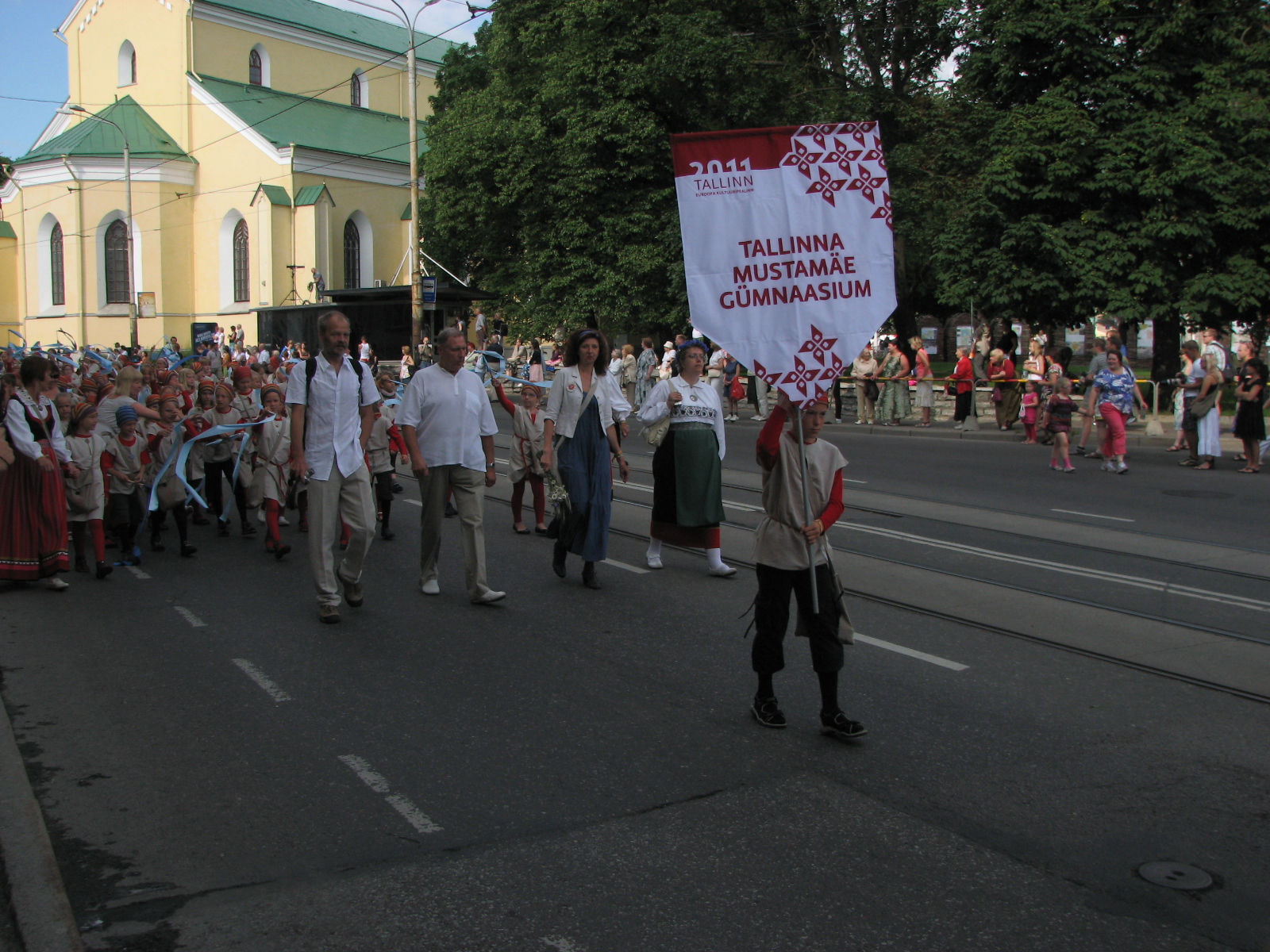 Tallinna Mustamäe Gümnaasiumi esindus XI noorte laulu- ja tantsupeo rongkäigus